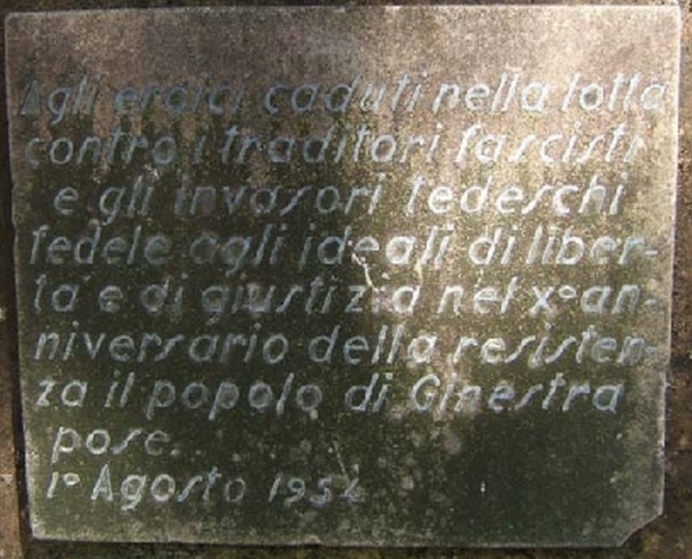 Lapide in memoria ai caduti contro i fascisti.